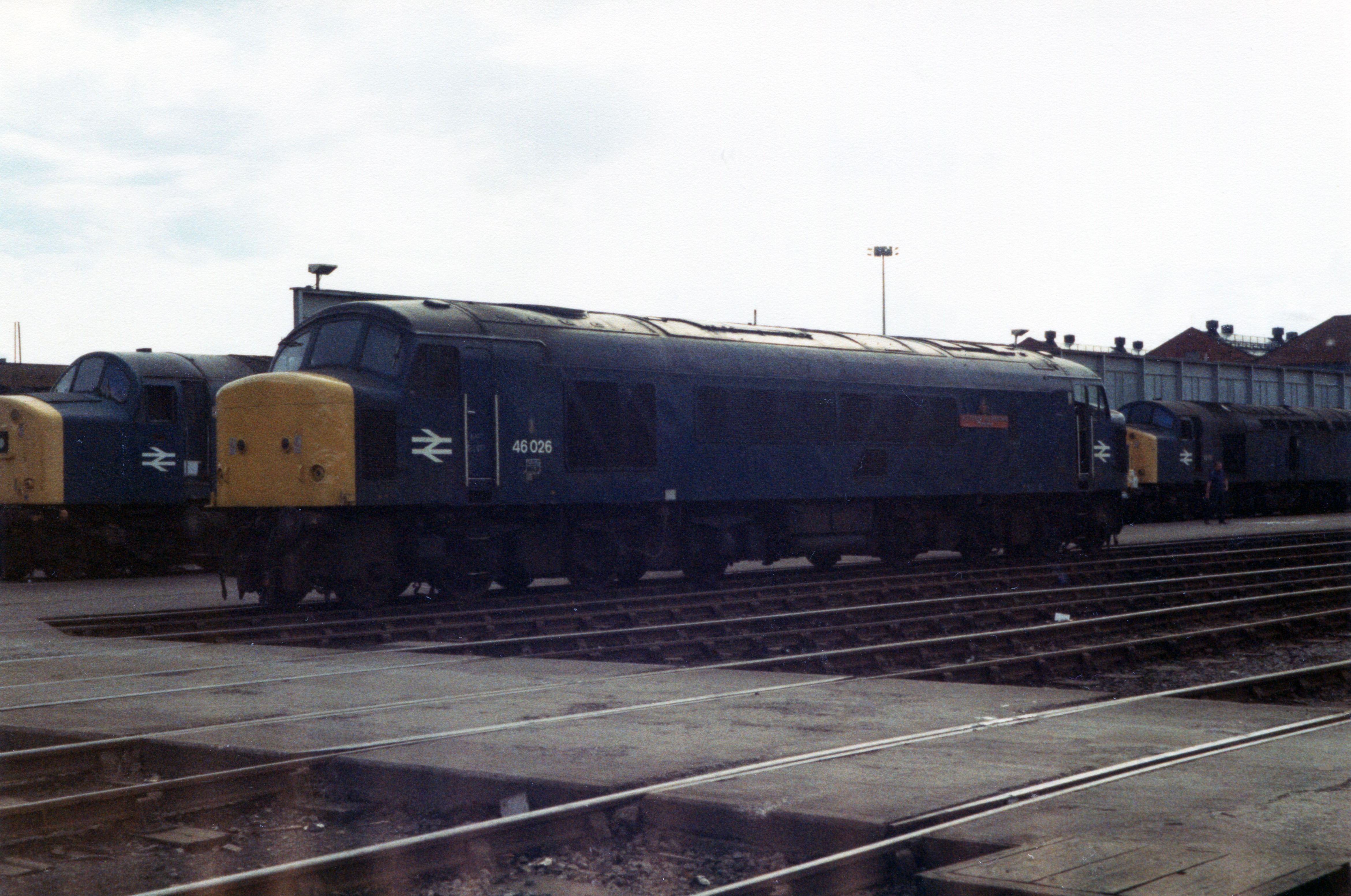 46026 - Crewe Works